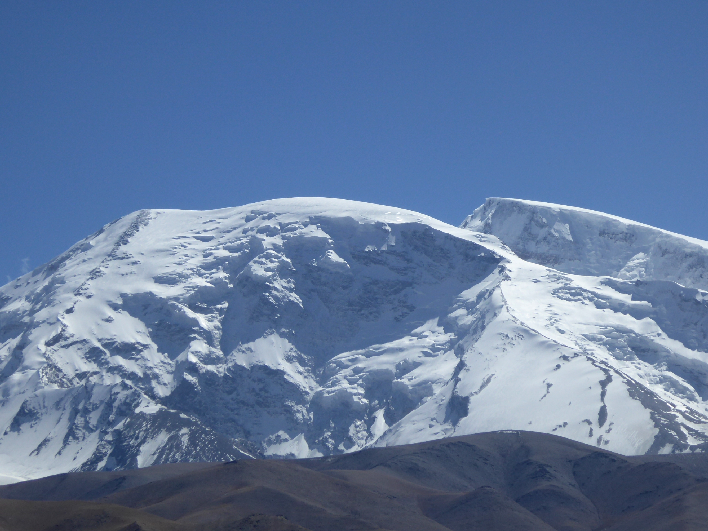 7,546m Muztagh Ata 3,600m Lake Karakul Karakoram Highway Kyrgyz Xinjiang China 新疆 吉爾吉斯 喀喇昆仑公路 喀拉庫勒湖 慕士塔格峰